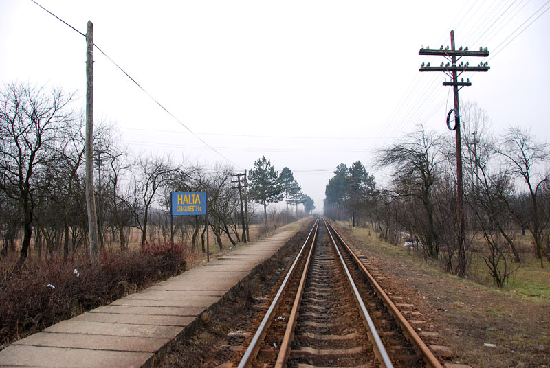 Crăciuneşti, Maramureş, Rumänien – Blick auf den Haltepunkt Crăciuneşti in Richtung Sighetu Marmaţiei